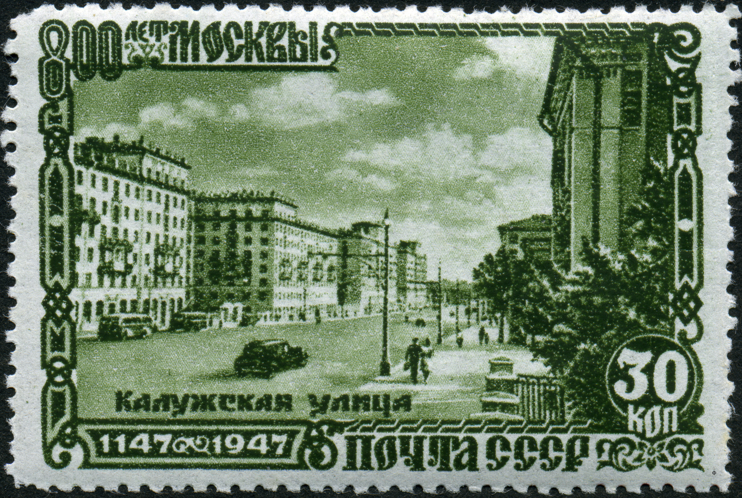 Марка СССР